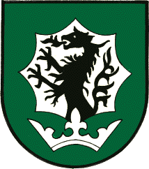 Wappen der Gemeinde Werndorf in Österreich